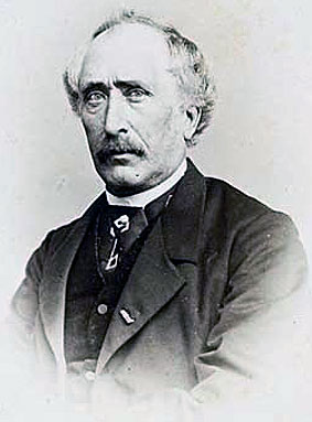 Willem van der Hucht